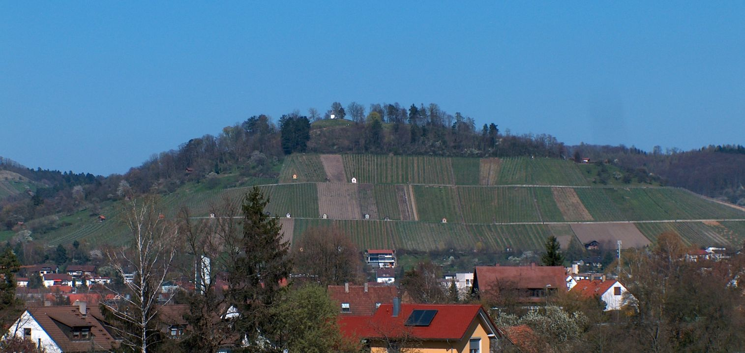 Blick auf den Weinberg Metzingen